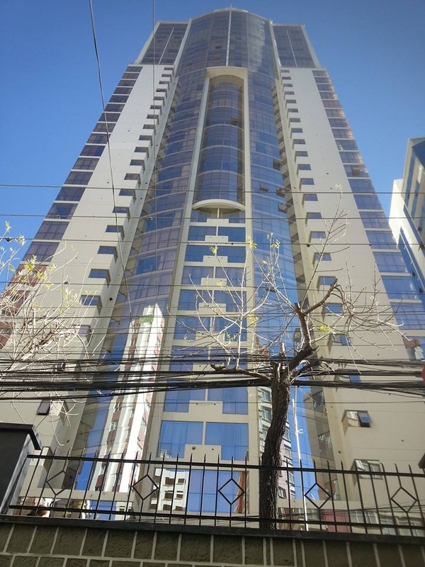 Foto de la Torre Girasoles en la ciudad de La Paz, Bolivia.